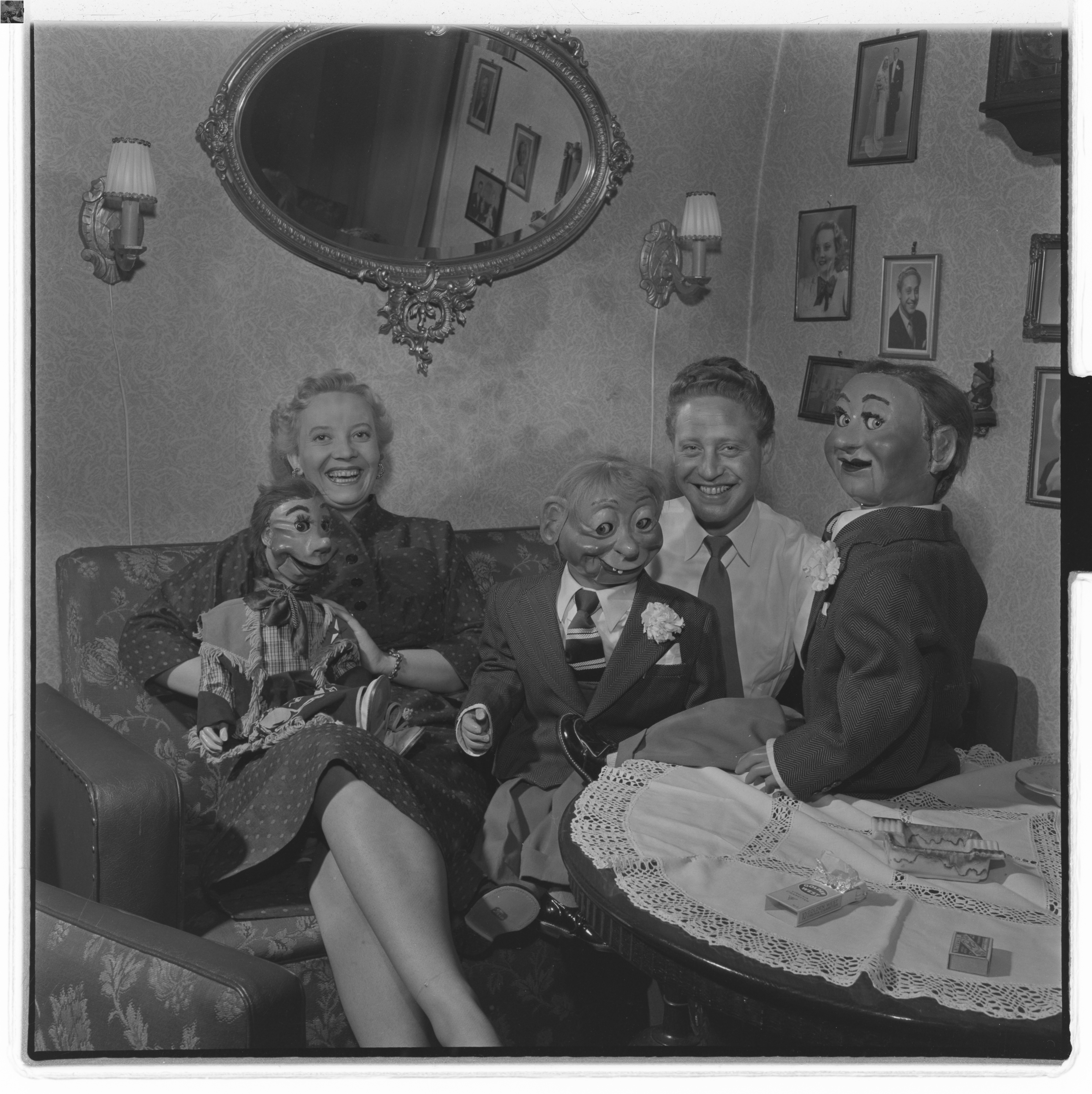 Bildet er hentet fra Arkivverket. Inger Jacobsen og Bülow. NÅ nr. 2, 1954 Arkivinstitusjon : Riksarkivet Arkivnavn : Billedbladet NÅ Sted : Norge, Ukjent, Uikjent, Ukjent Emneord: Menn, Kvinner, Dukker Avbildet: Bülow, Jackie; Jackobsen, Inger